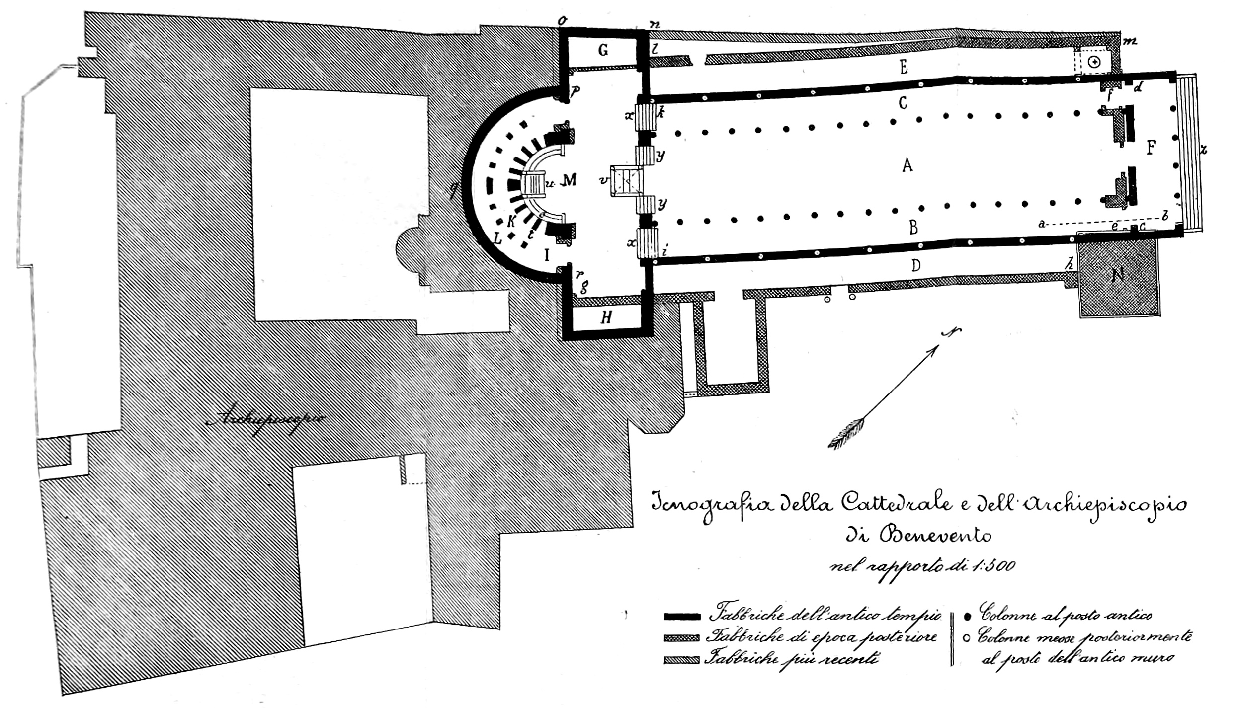 Illustrazioni da I monumenti e le opere d'arte della città di Benevento: lavoro storico, artistico, critico, di Almerico Meomartini, Tipografia di L. de Martini e figlio, Benevento, 1889